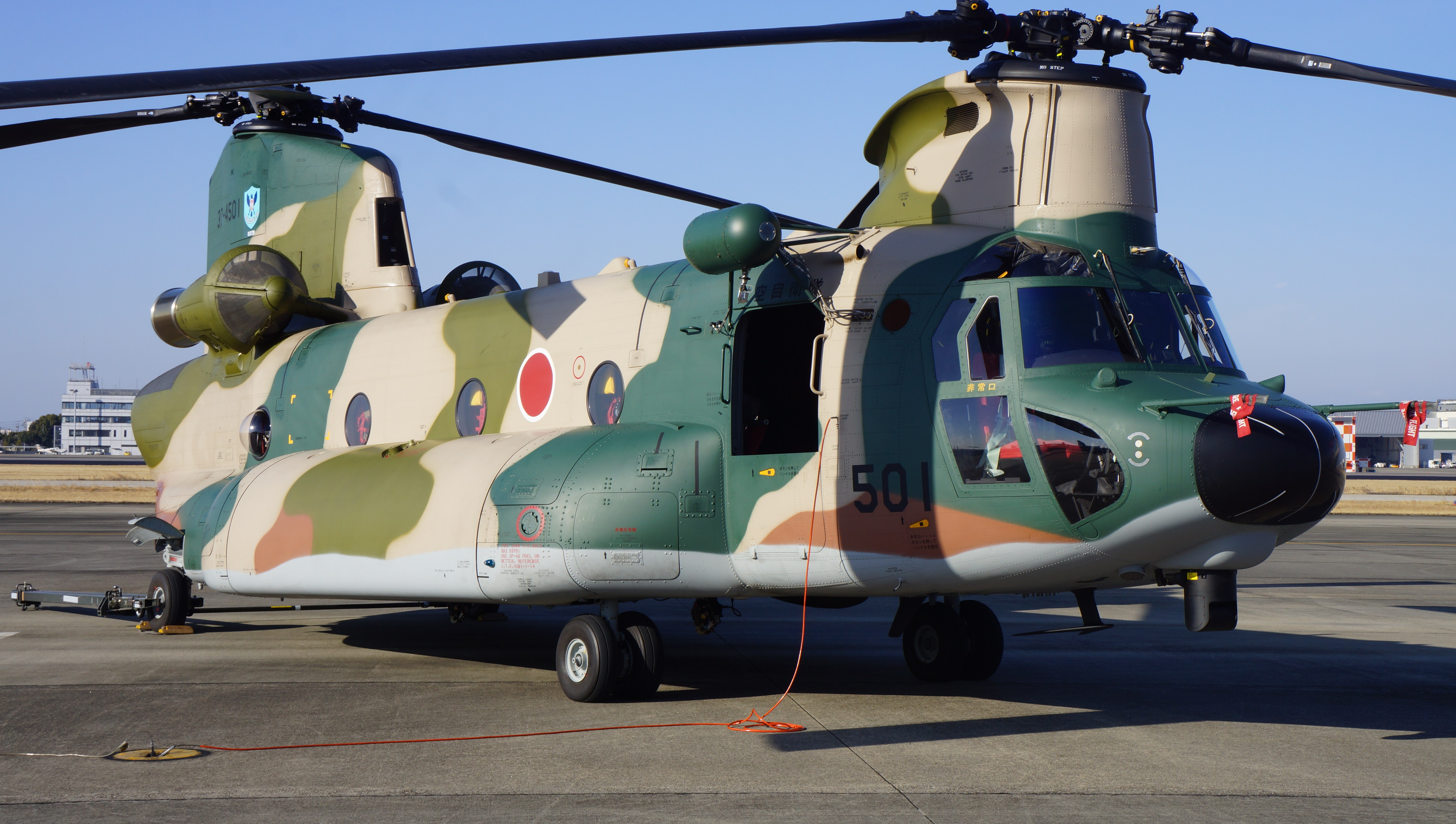 航空自衛隊 CH-47J（LR）輸送ヘリコプター（37-4501号機）。 2014年2月23日 小牧基地にて。